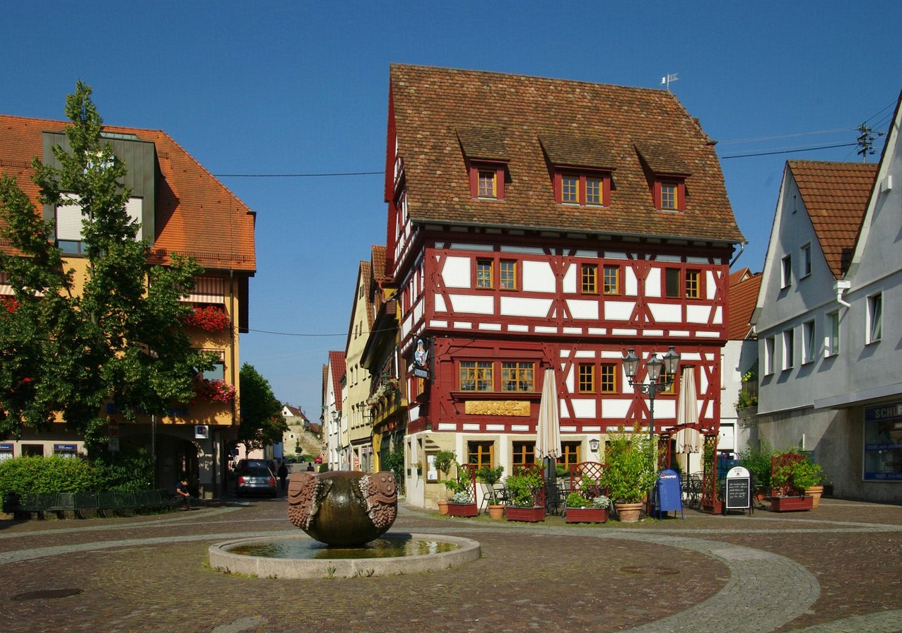 Bönnigheim, am Marktplatz